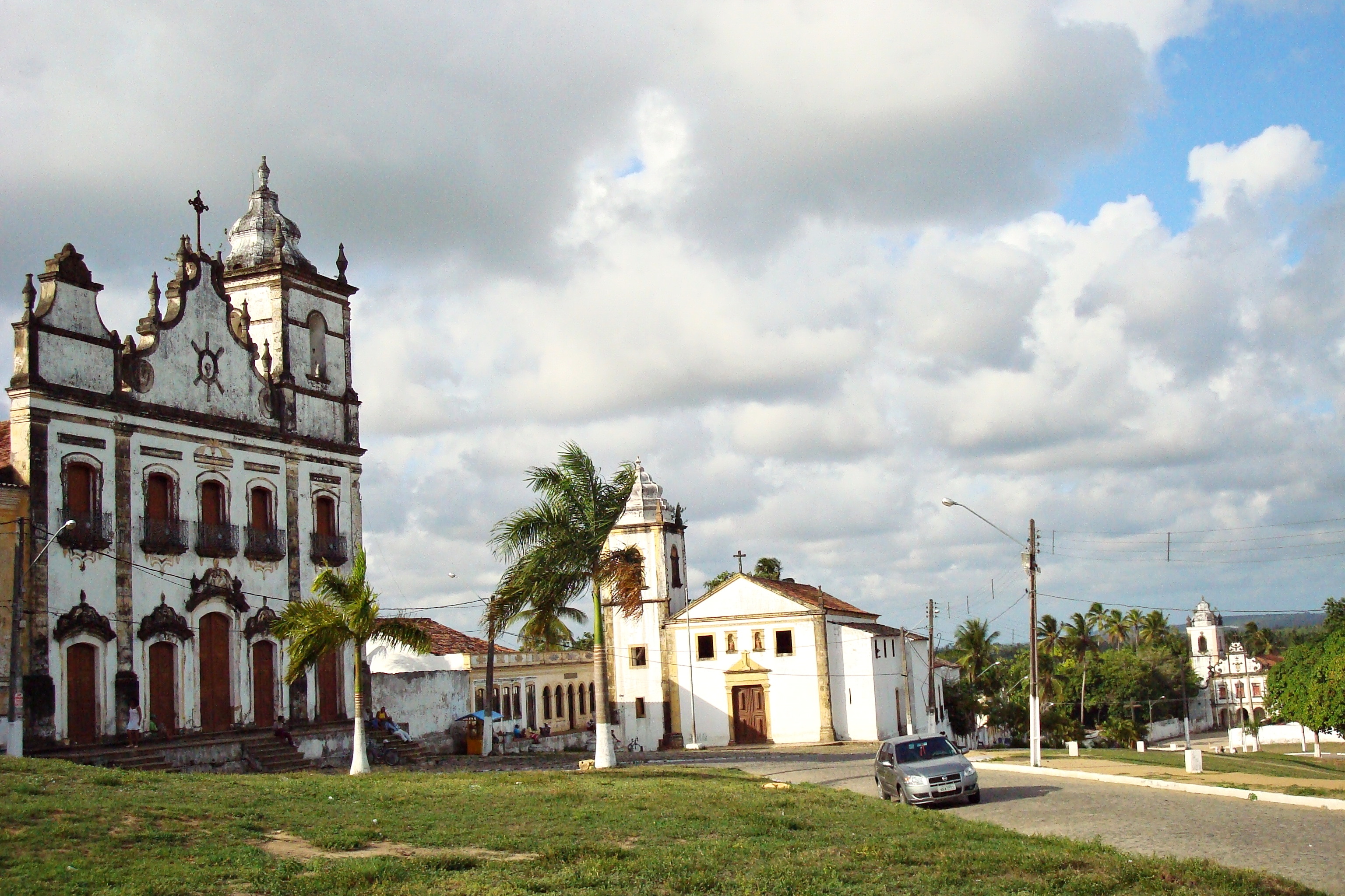 Igarassu, Pernambuco, Brasil